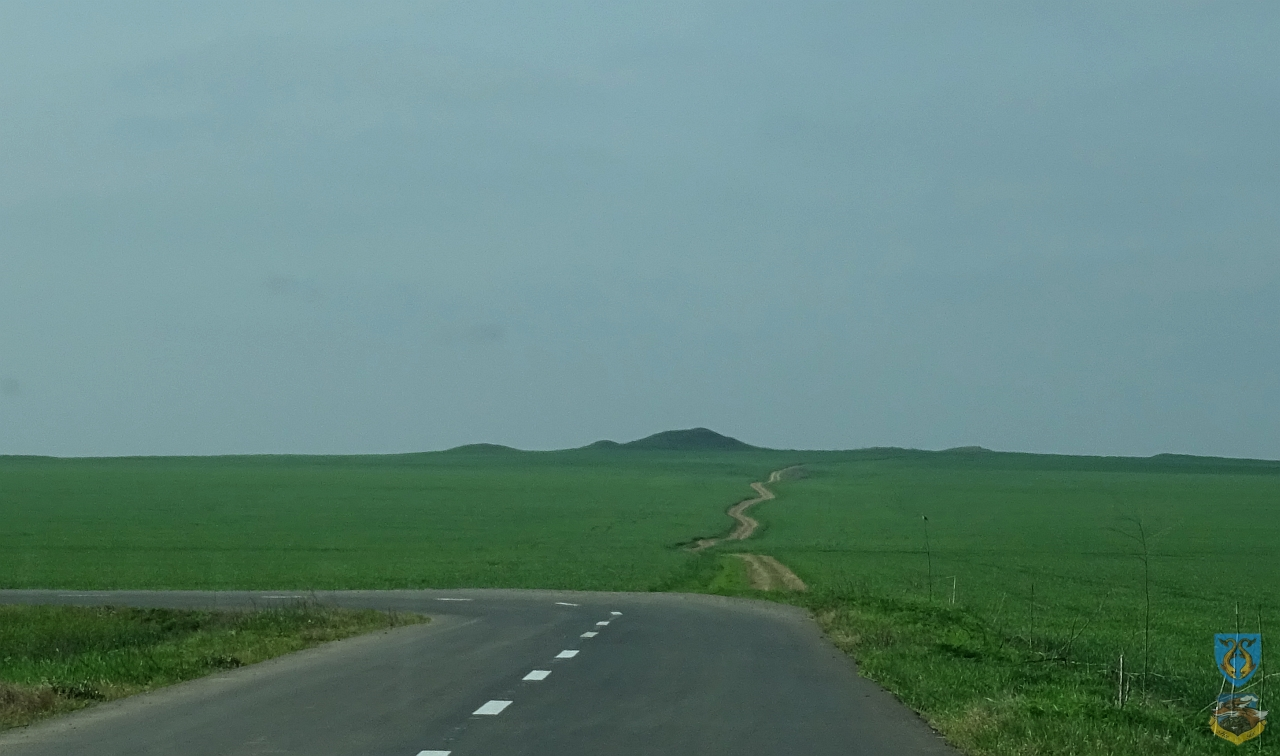 Necropolă tumulară 02